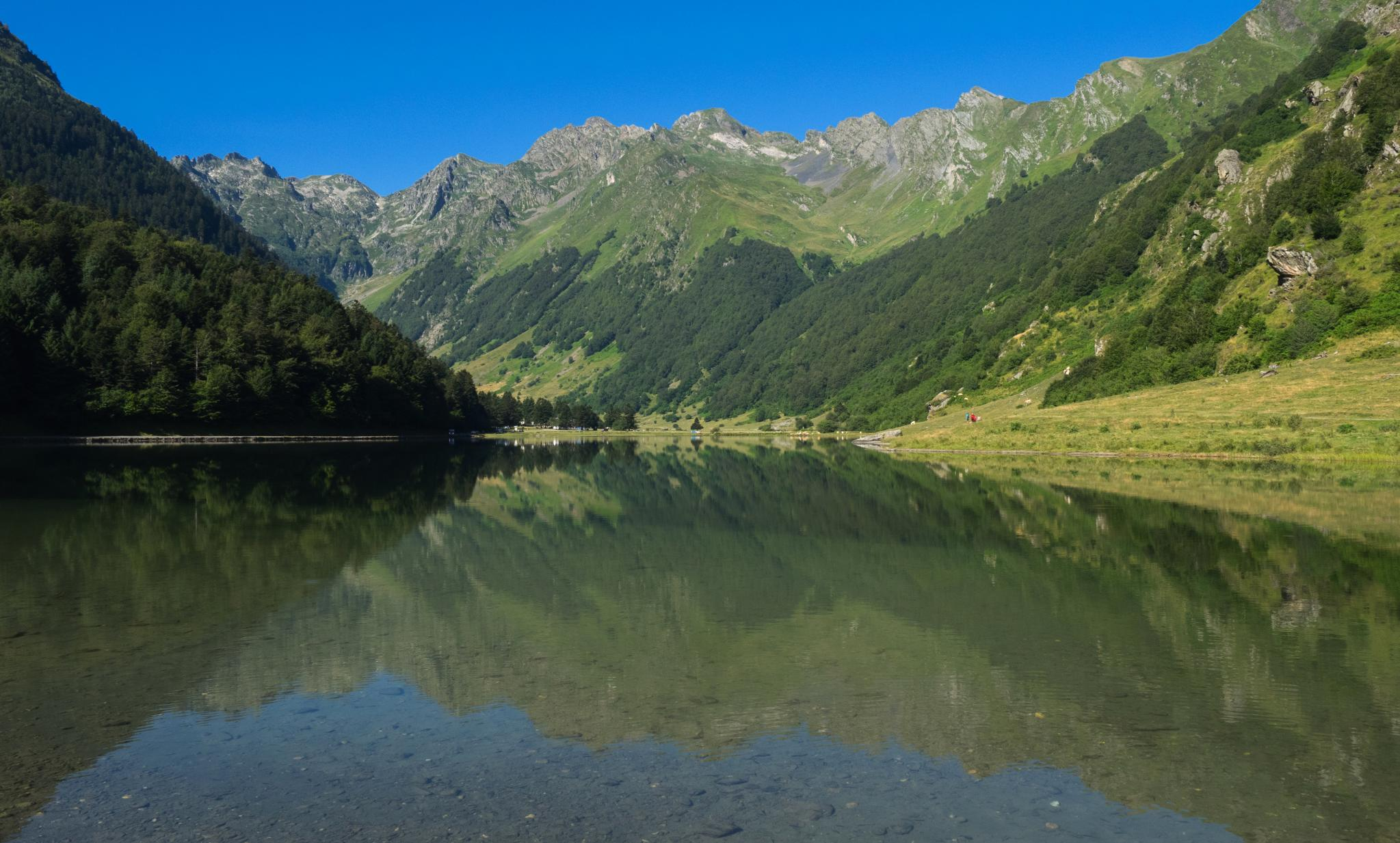 Lac d'Estaing et massif du Pic du Midi d'Arrens. En face, entre les deux cols et de gauche à droite : le pic de Palouma, le soum de Bassia de Hoo, et le pic de l'Arcoèche.